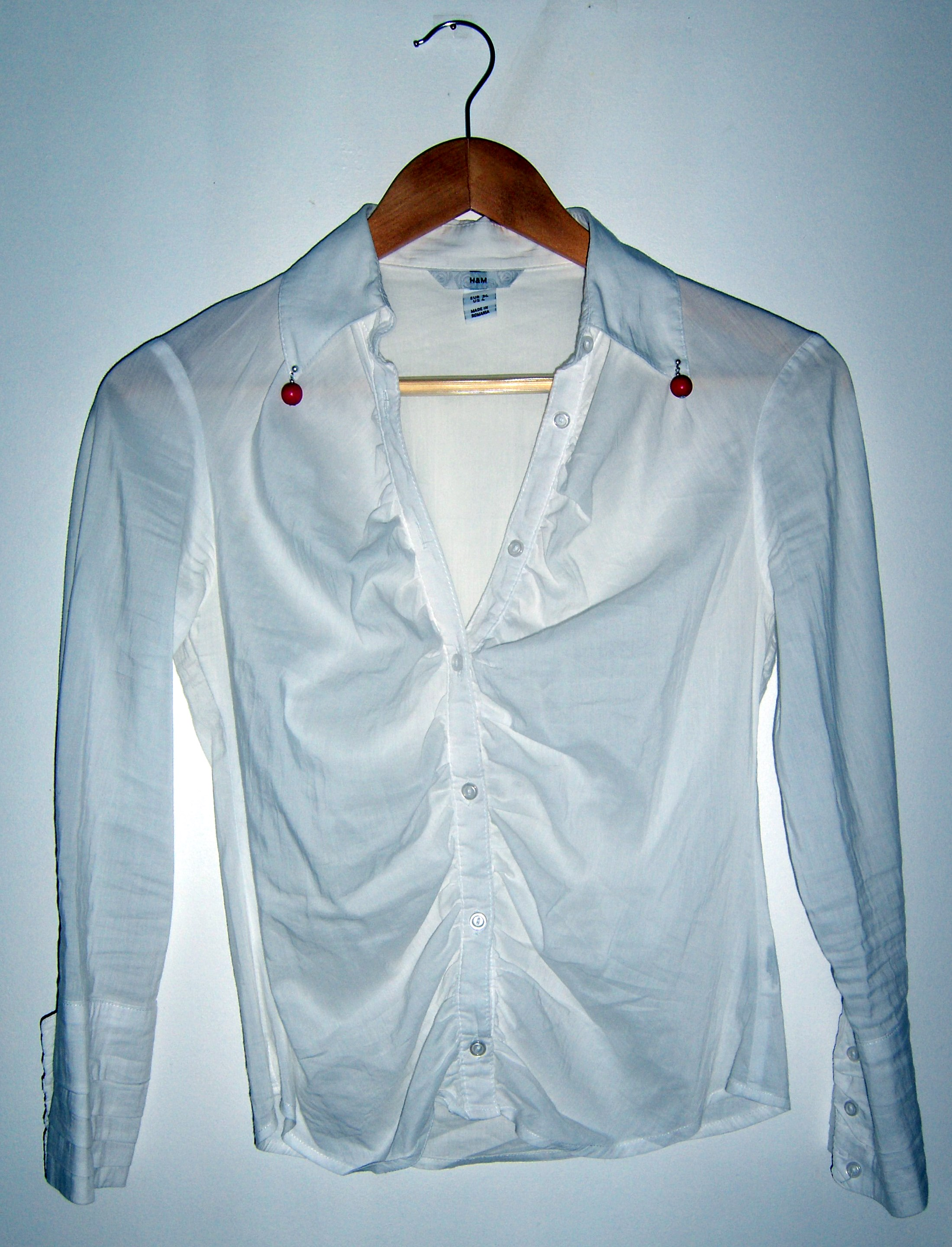 Camisa